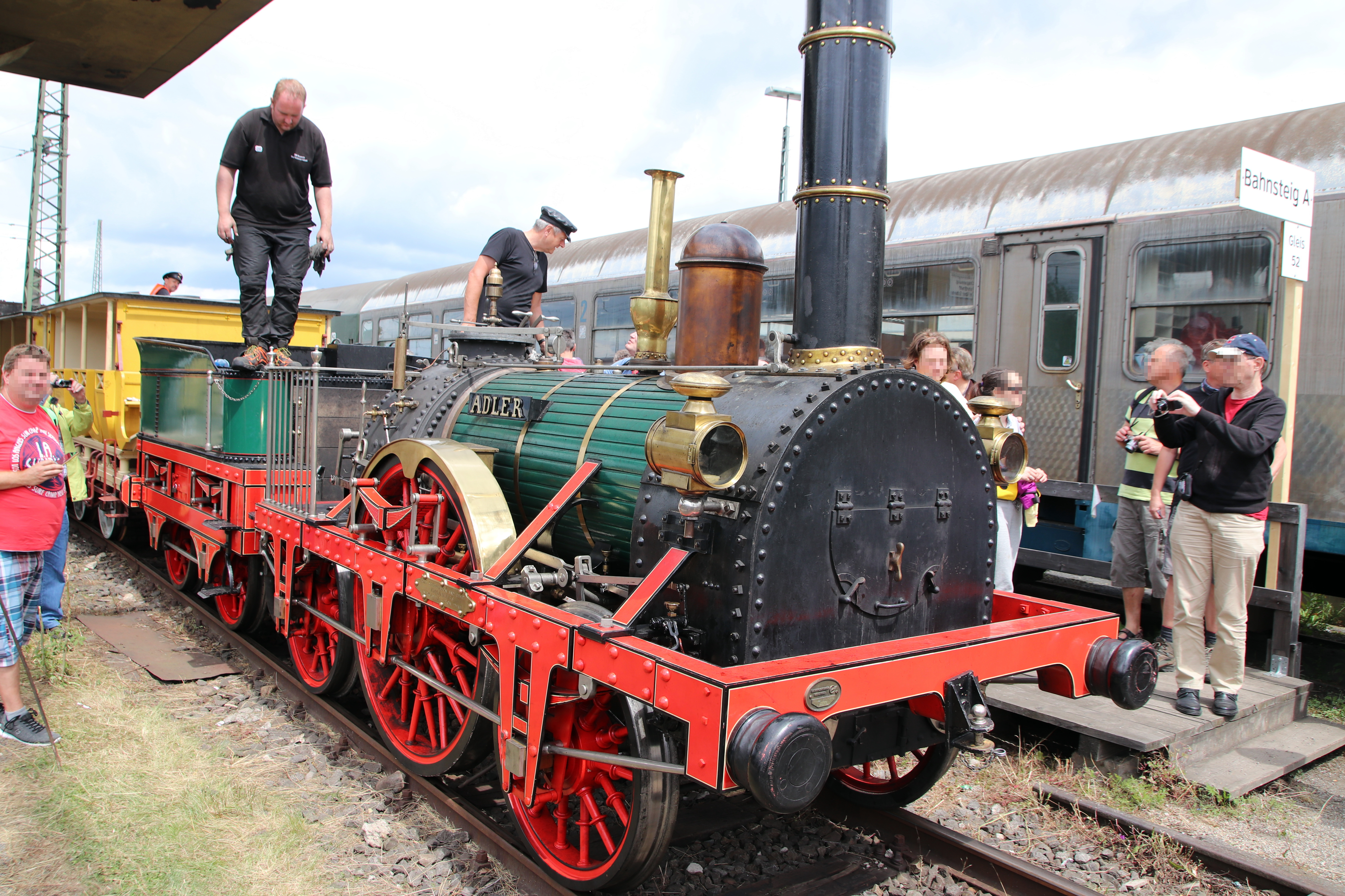 DB-Museum Koblenz-Lützel, Sommerfest 2018